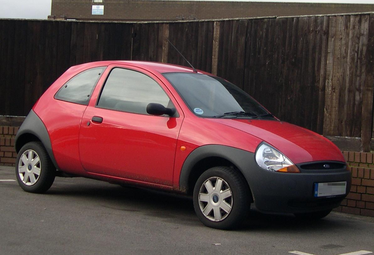 Ford Ka